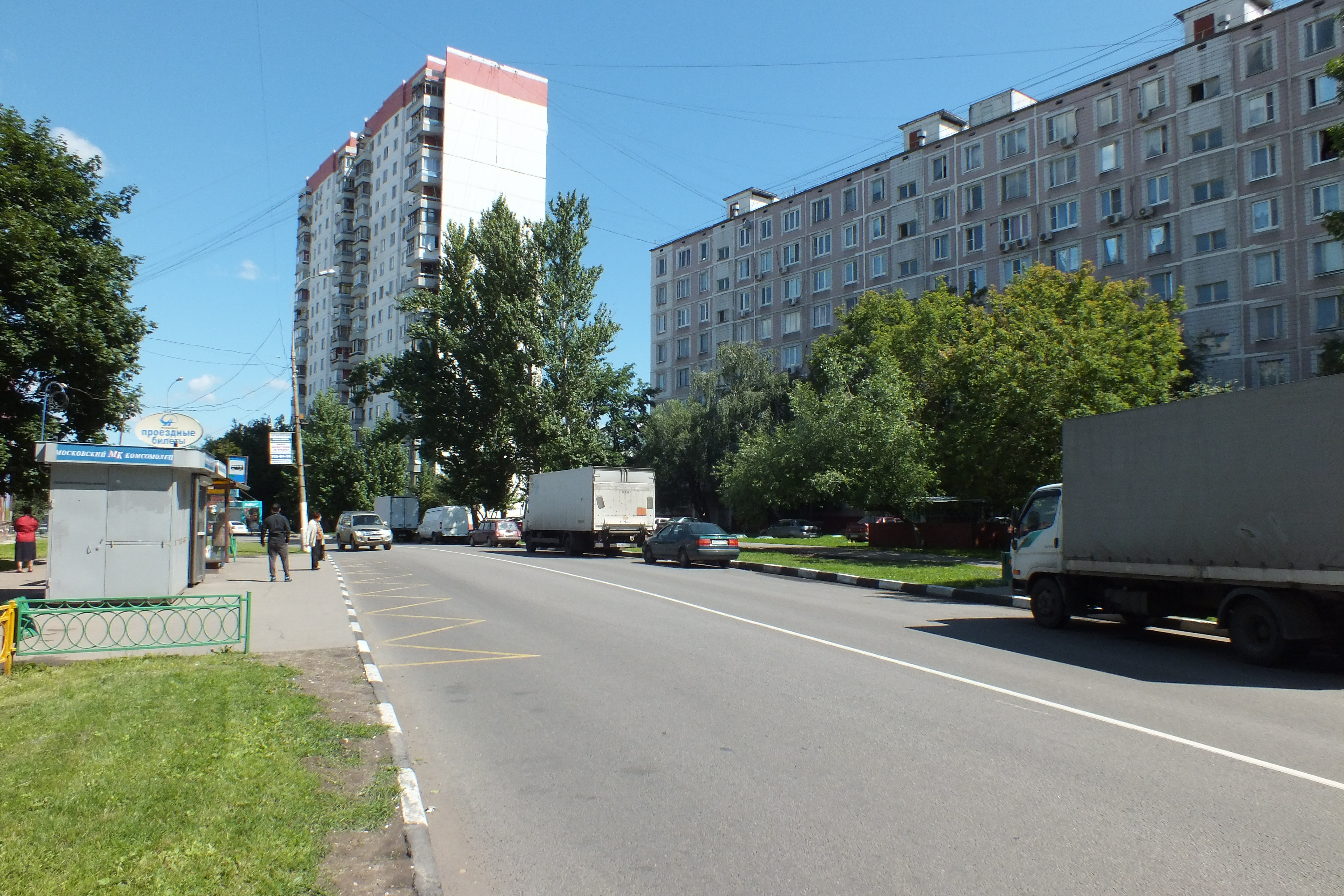 Кустанайская улица в Москве, середина улицы.